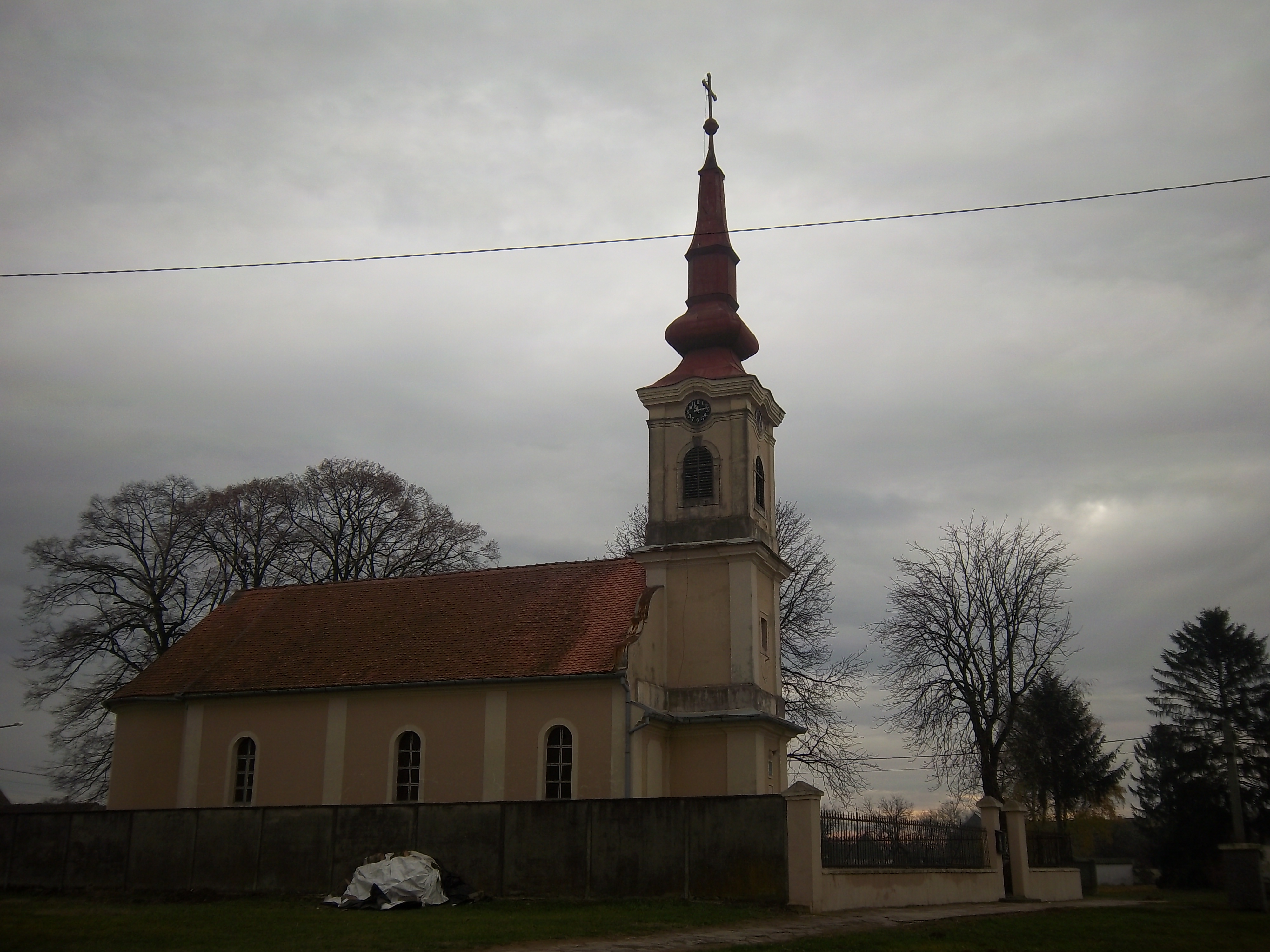 Pravoslavna crkva u Negoslavcima.